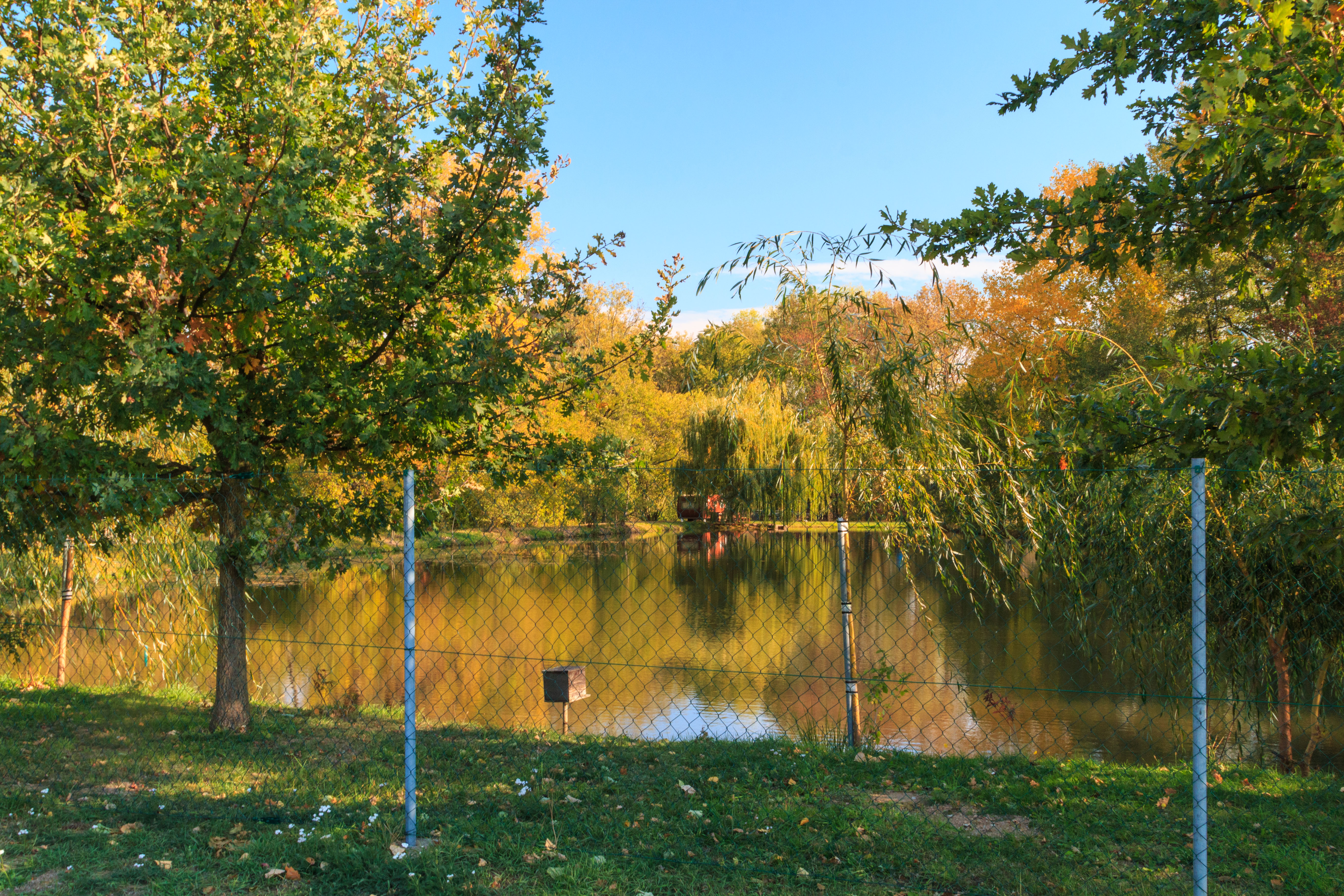 Rybník Podskalák u Zaječic Project: Vodstvo. Ticket: 1617.